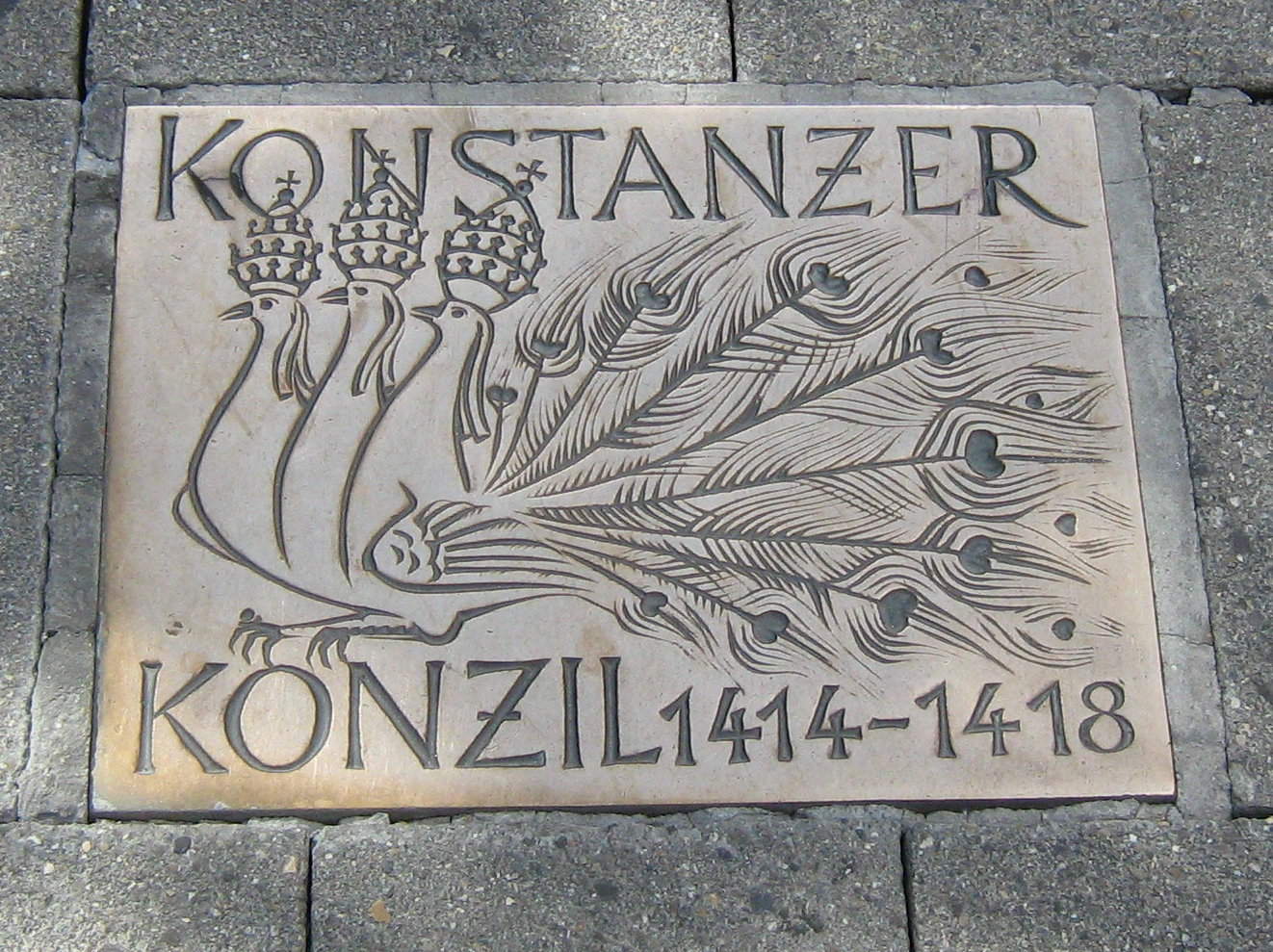 Tafel Konstanzer Konzil 1414-1418 (Fusgängerzone)